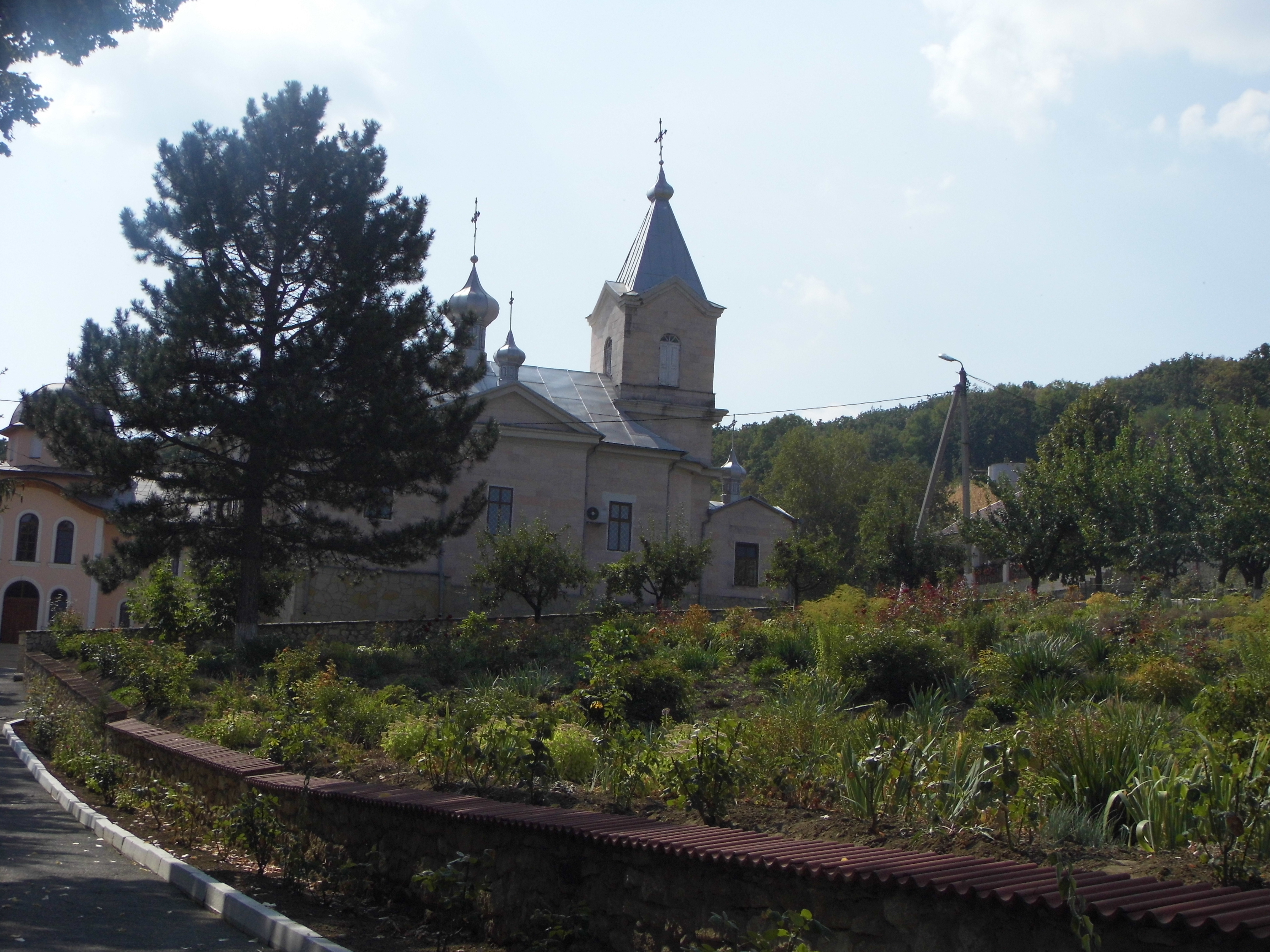 Монастырь Святого Георгия в селе Суручены, Молдавия